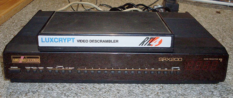 Luxcrypt ontvanger voor RTL 4 en een analoge satellietontvanger van Amstrad.